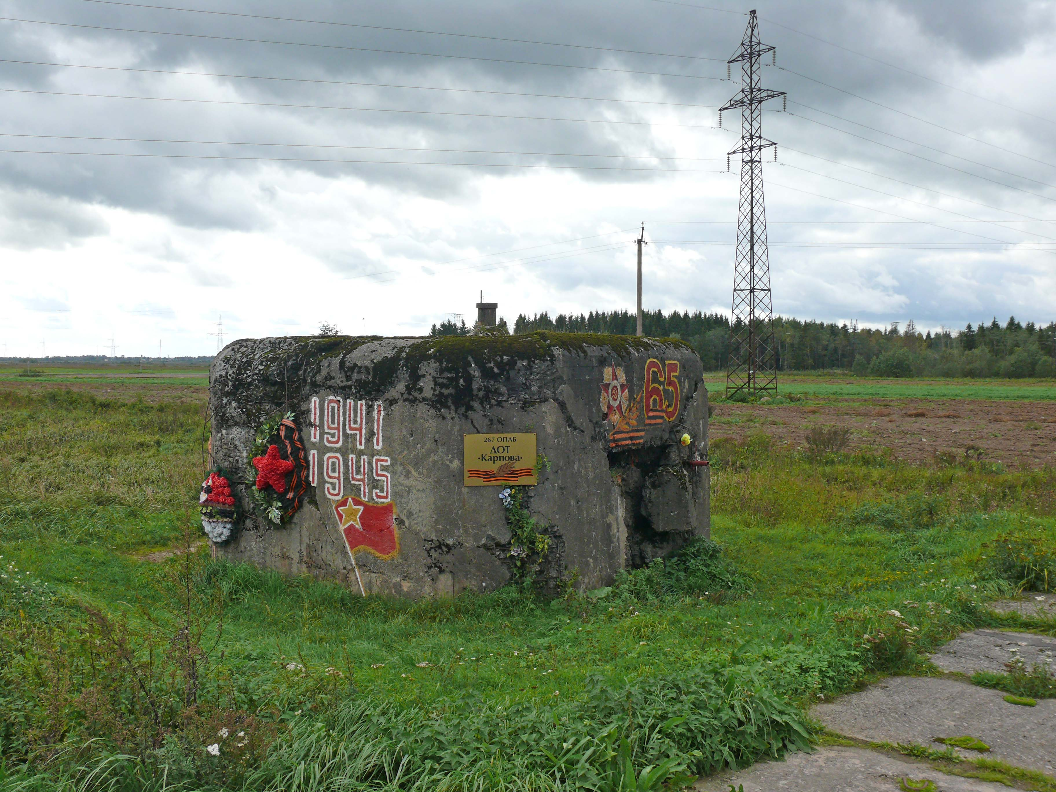 ДОТ Карпова (лейтенанта М. В. Дёмина). Красногвардейский укрепрайон, Ленинградская область